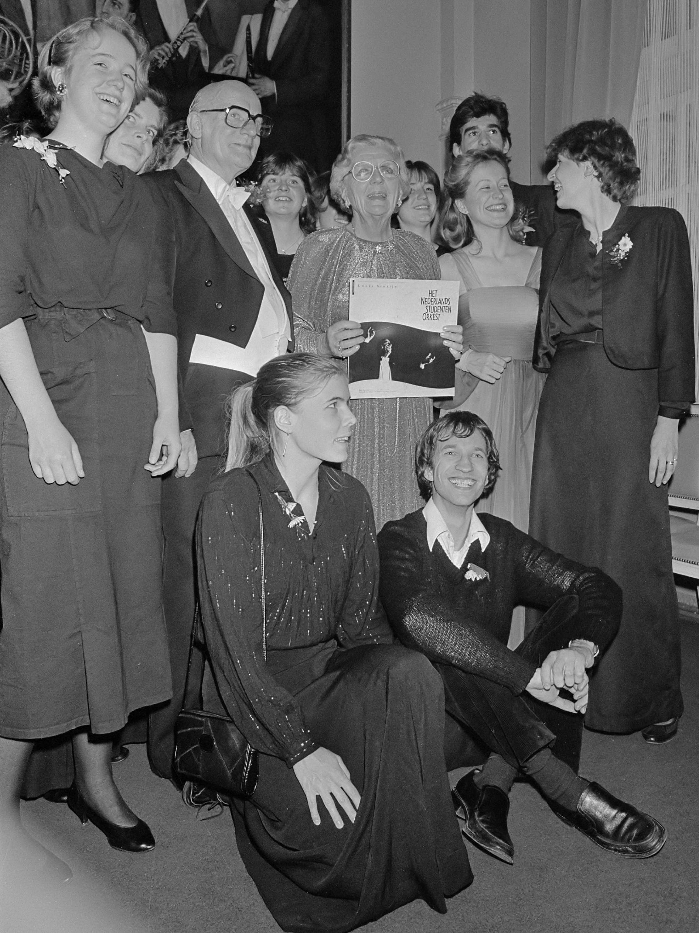 Prinses Juliana bij slotconcert van het Nederlandse Studentenorkest in Concertgebouw , dirigent Louis Stotijn 22 januari 1985